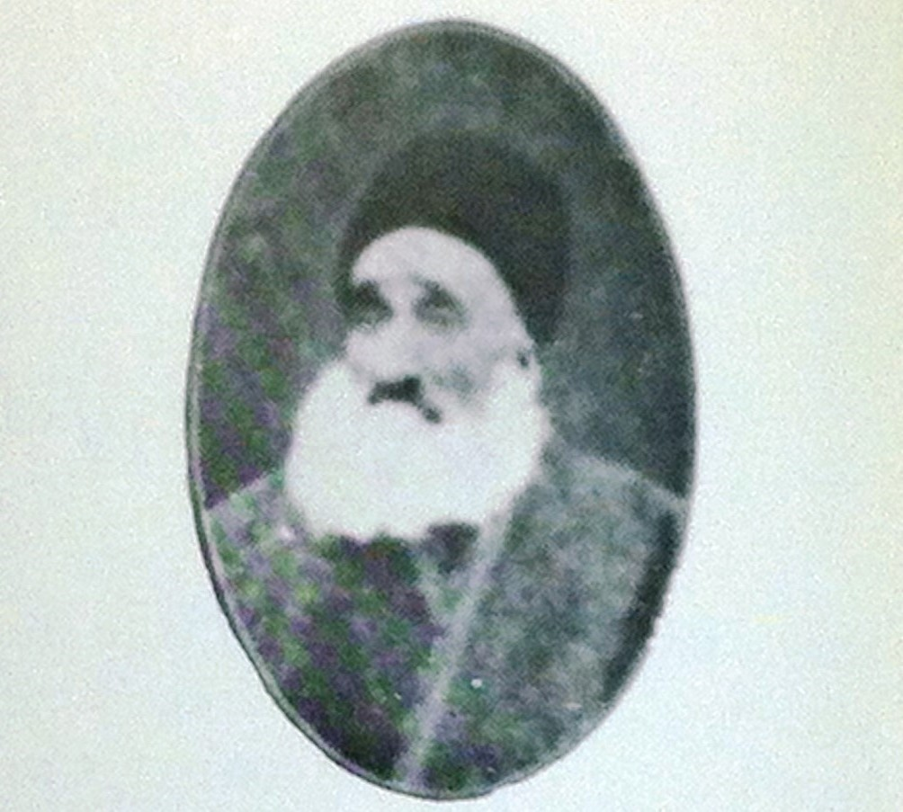 מירזא מוחמד קולי, מנהל החווה בנוקייב